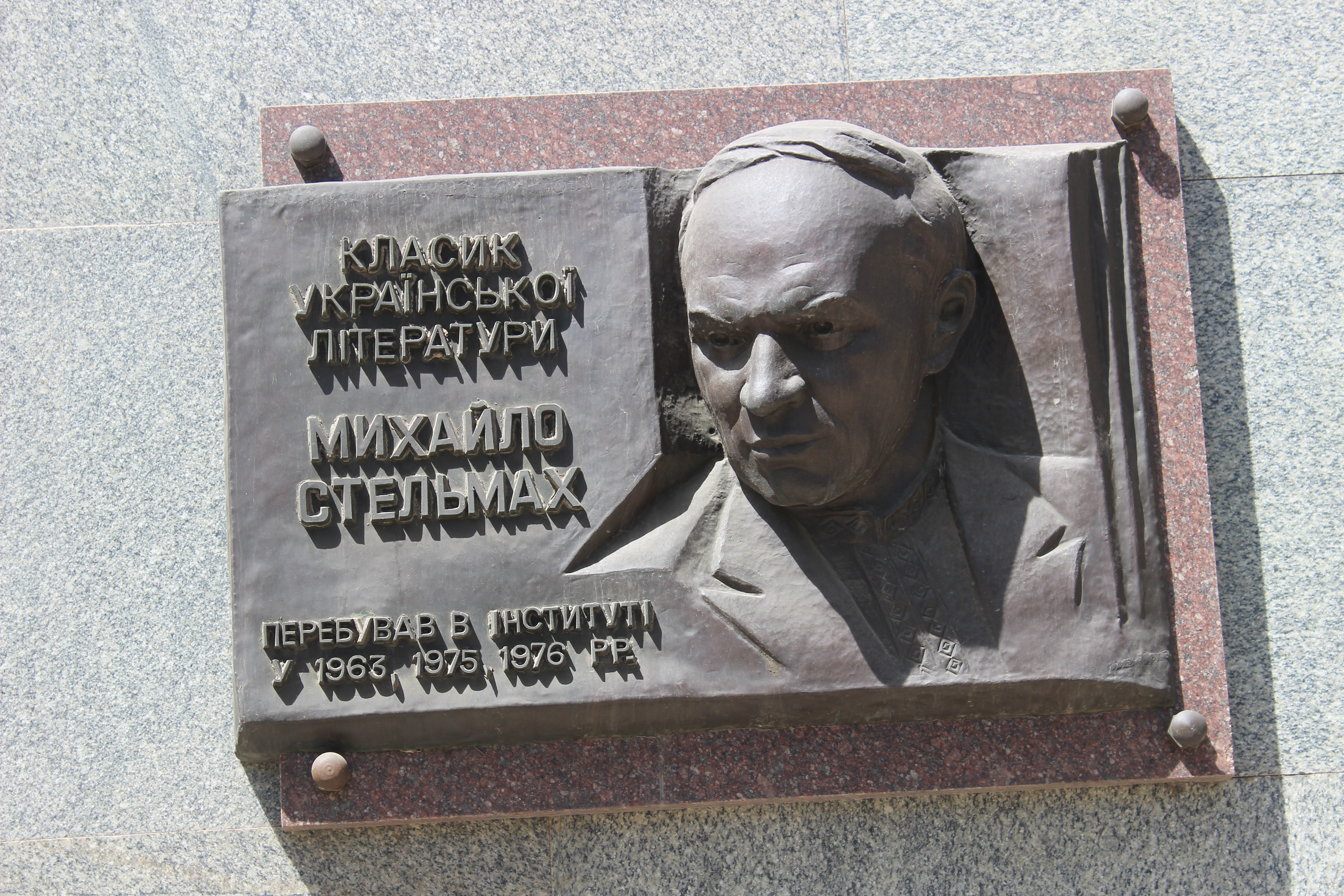 Будинок чоловічої гімназії, Запоріжжя, вул. Жуковського, 66